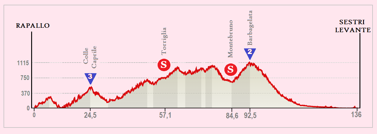 Perfil de la 3.ª etapa del Giro de Italia 2015